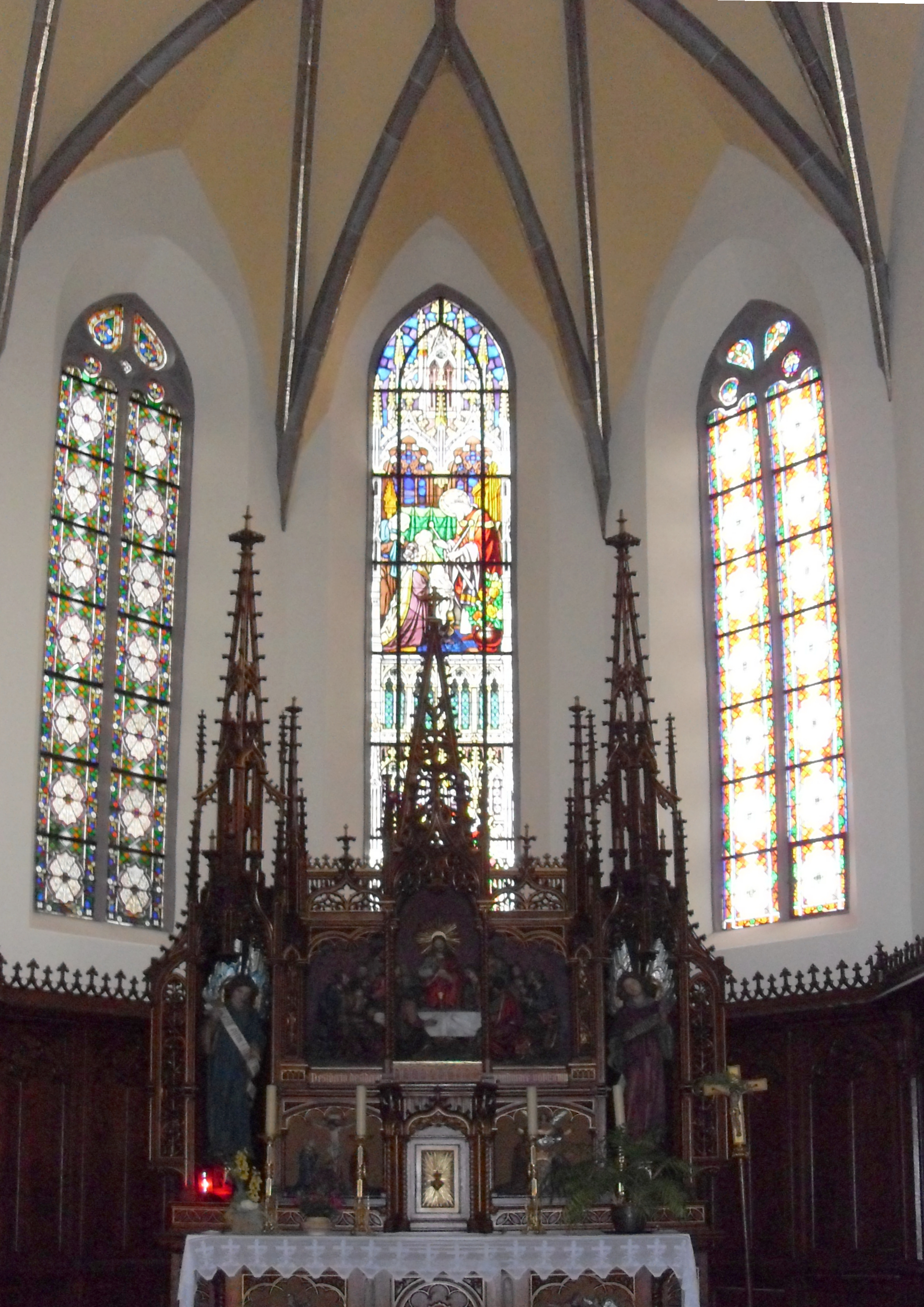 L'intérieur d'église Saint-Blaise à Hartmannswiller